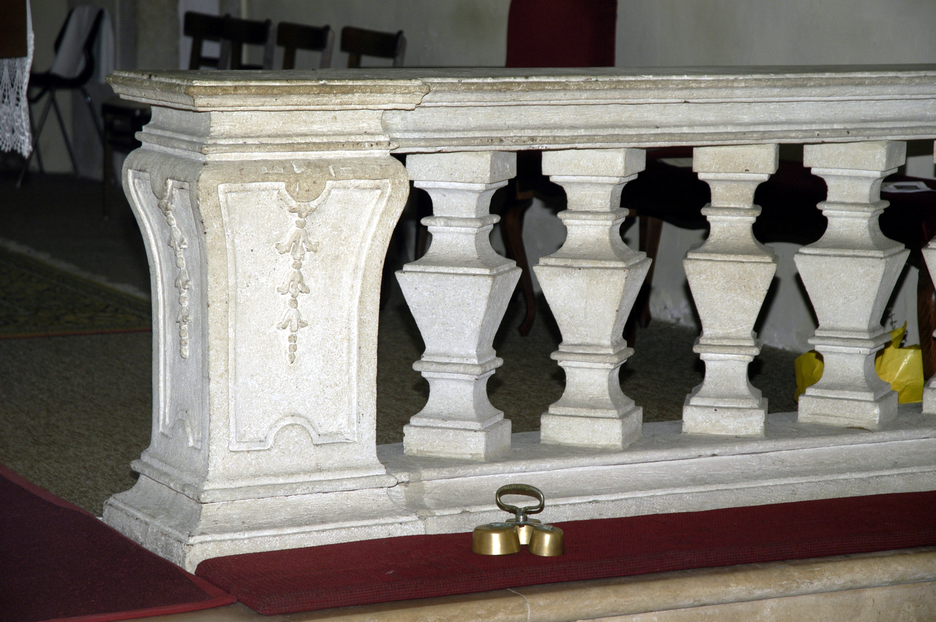 Kommunionbank in der katholischen Pfarrkirche Maria Magdalena in Unterdürnbach